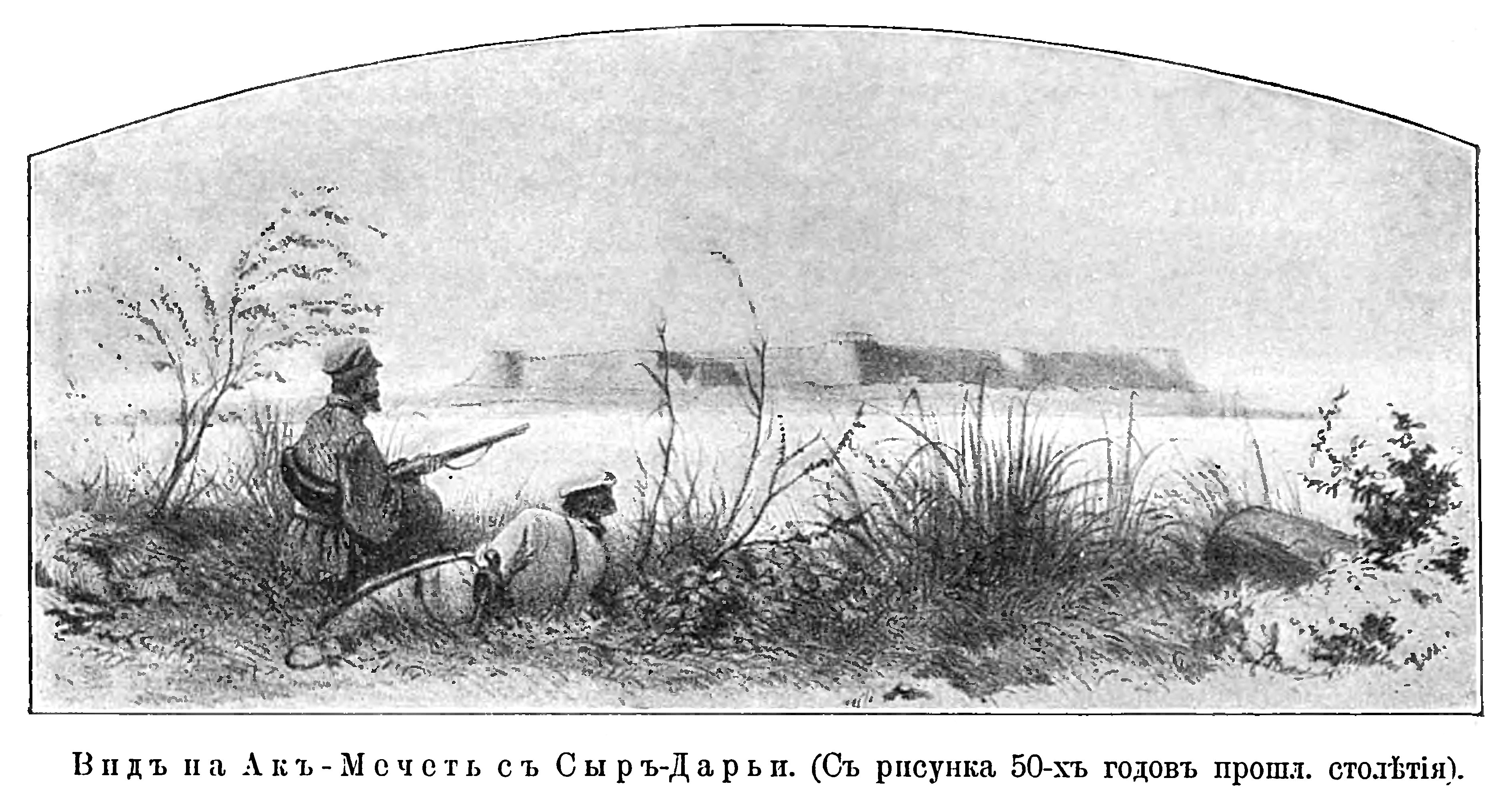 Изображение из «Военной энциклопедии» изданной книгоиздательским товариществом Ивана Дмитриевича Сытина. Санкт-Петербург; 1911—1915 гг. Фото к статье «Ак-Мечеть».